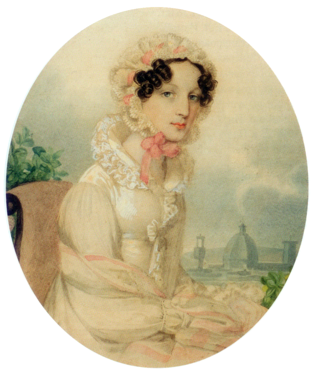 Шарлотта Ивановна Убри, ур. Ферзен (1791—после 1875)